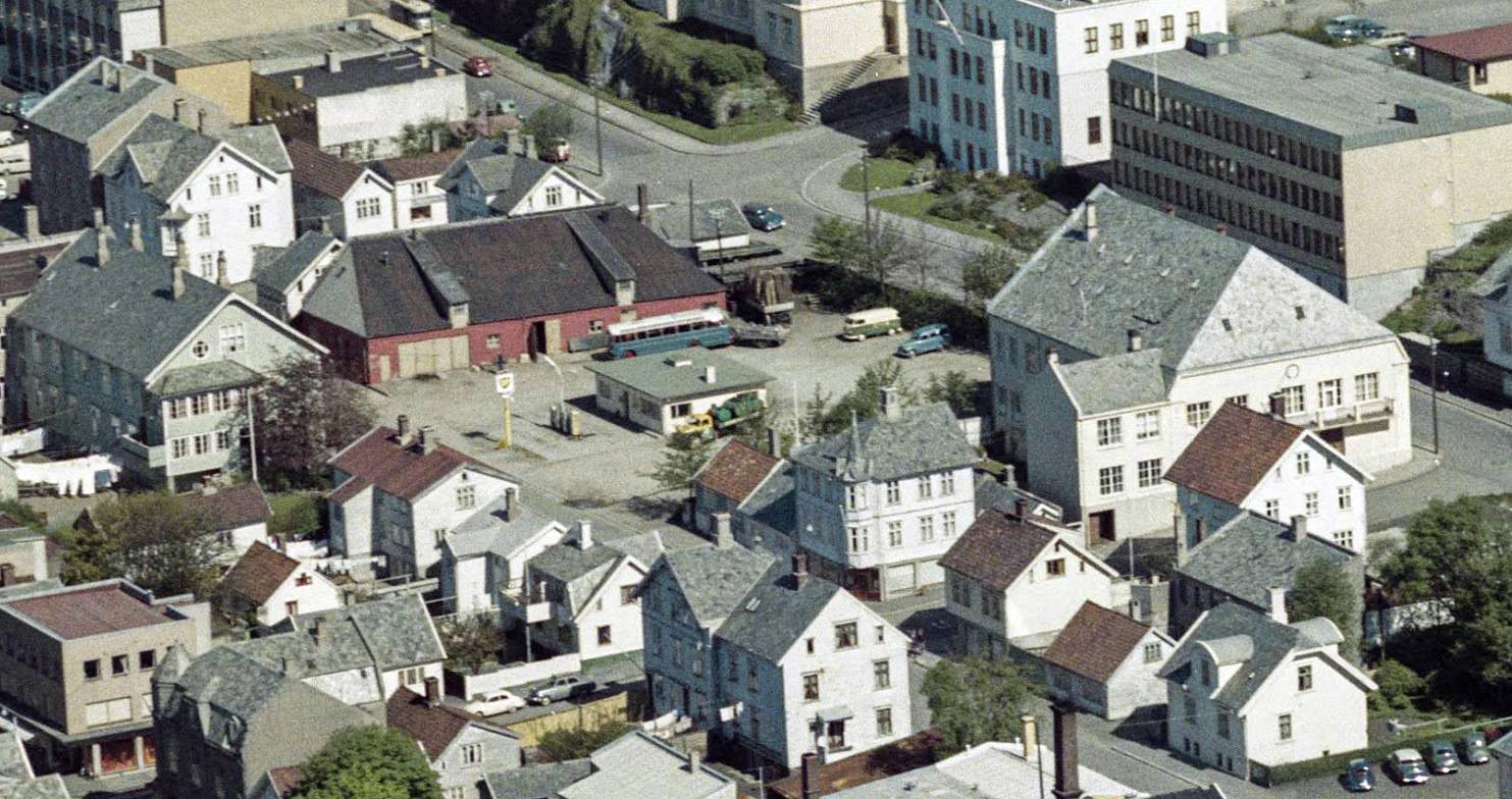 Den gamle turnhallen i Haugesund